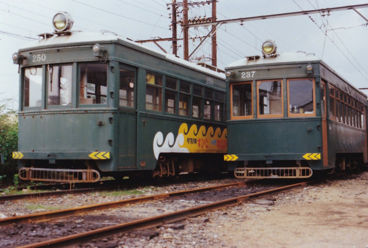 平野線廃線と共にお役御免となったモ２０５形。この写真を撮影した当時（昭和５６年頃）には車庫のいたる所に２０５形が転がっていた。